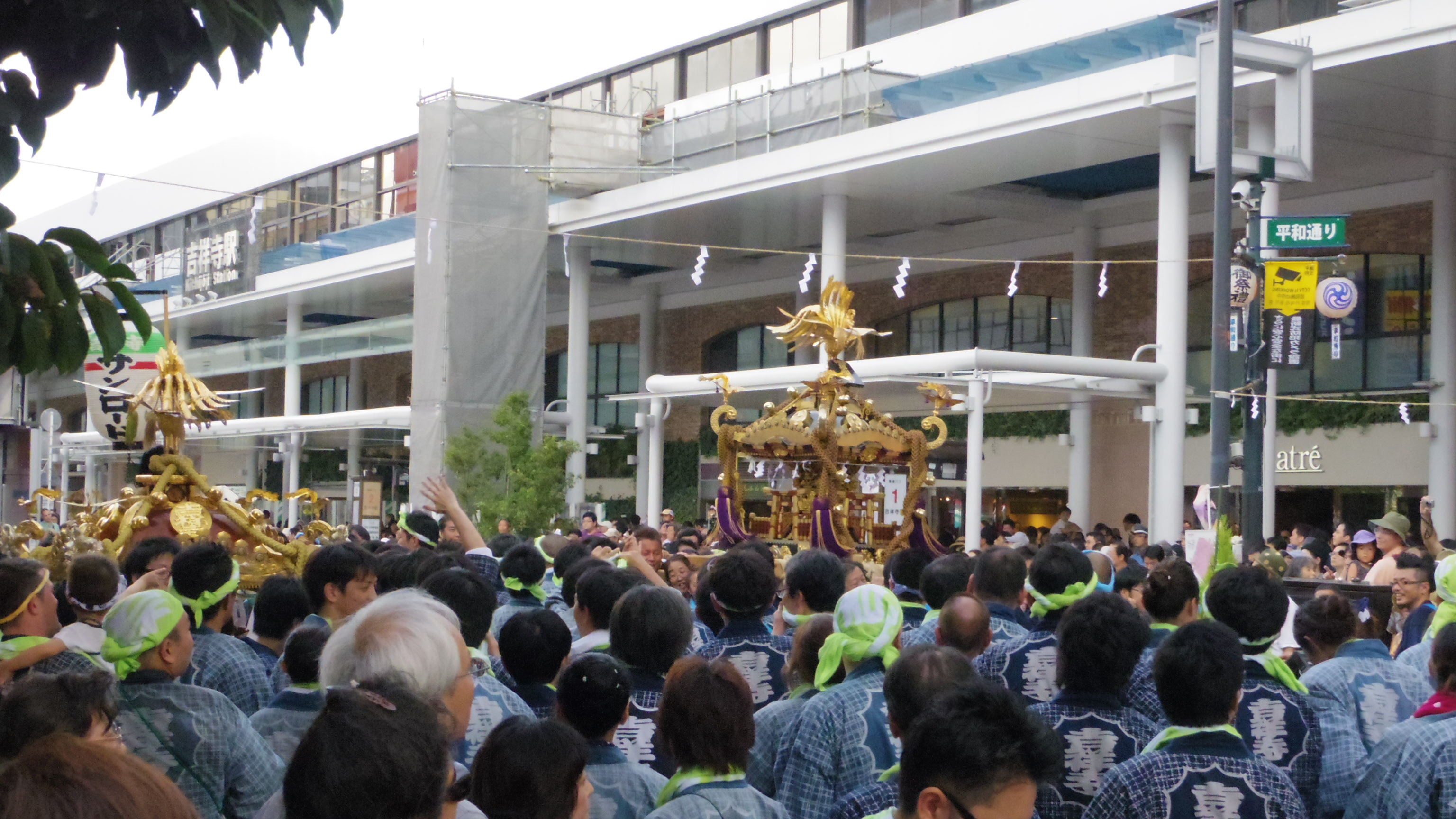 「第42回吉祥寺秋まつり」（2014年9月13日、14日）宮神輿渡御。JR吉祥寺駅前にて。